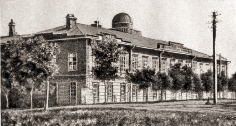 La scuola dello zemsto di Vjatka frequentata da Stepan Chalturin